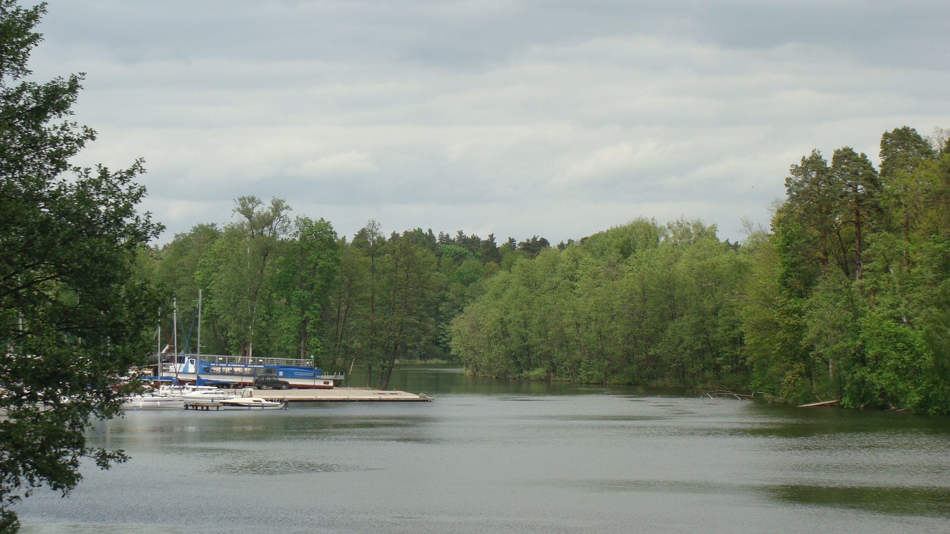 port - Ruciane - Nida